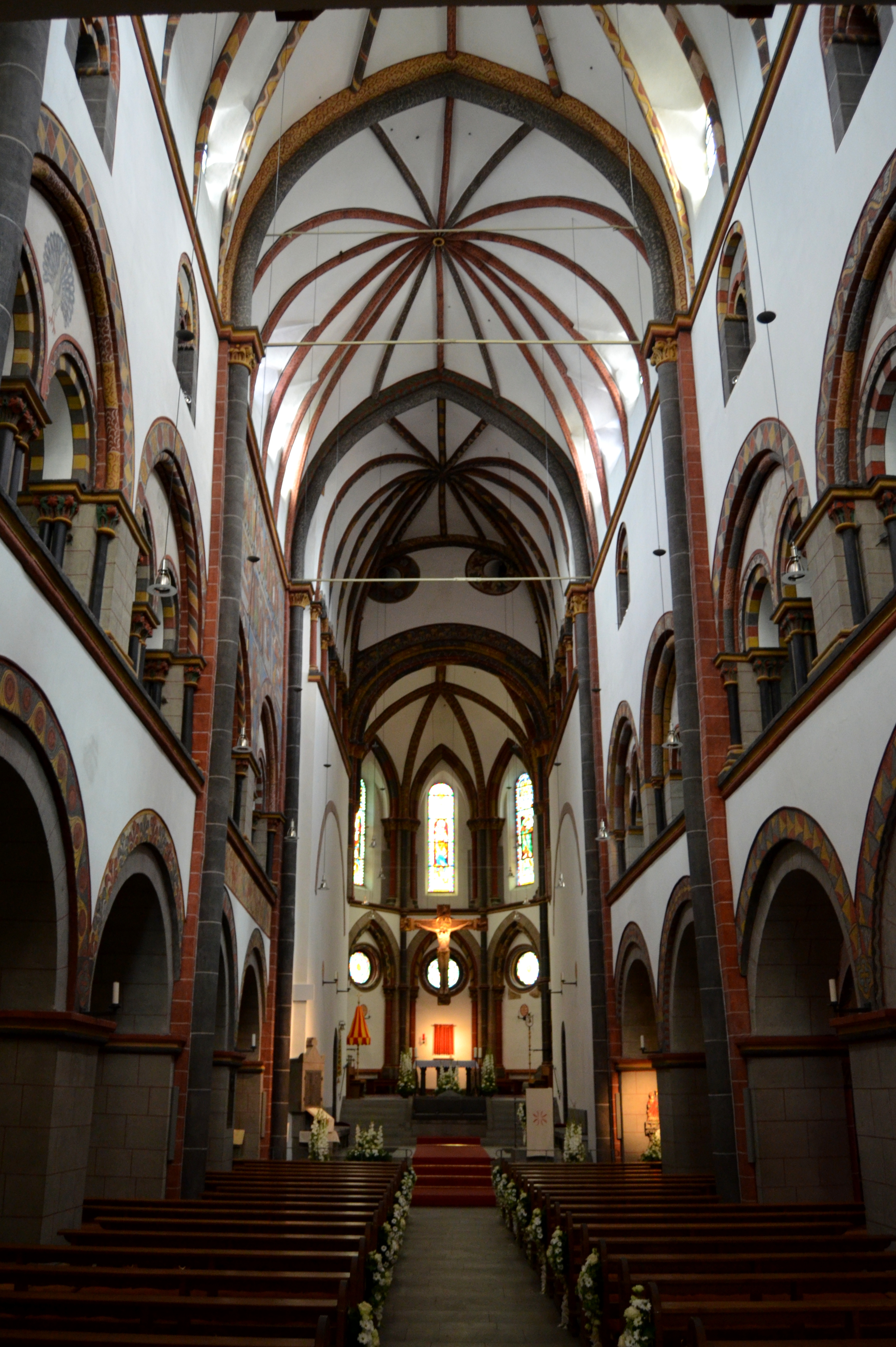 Interieur